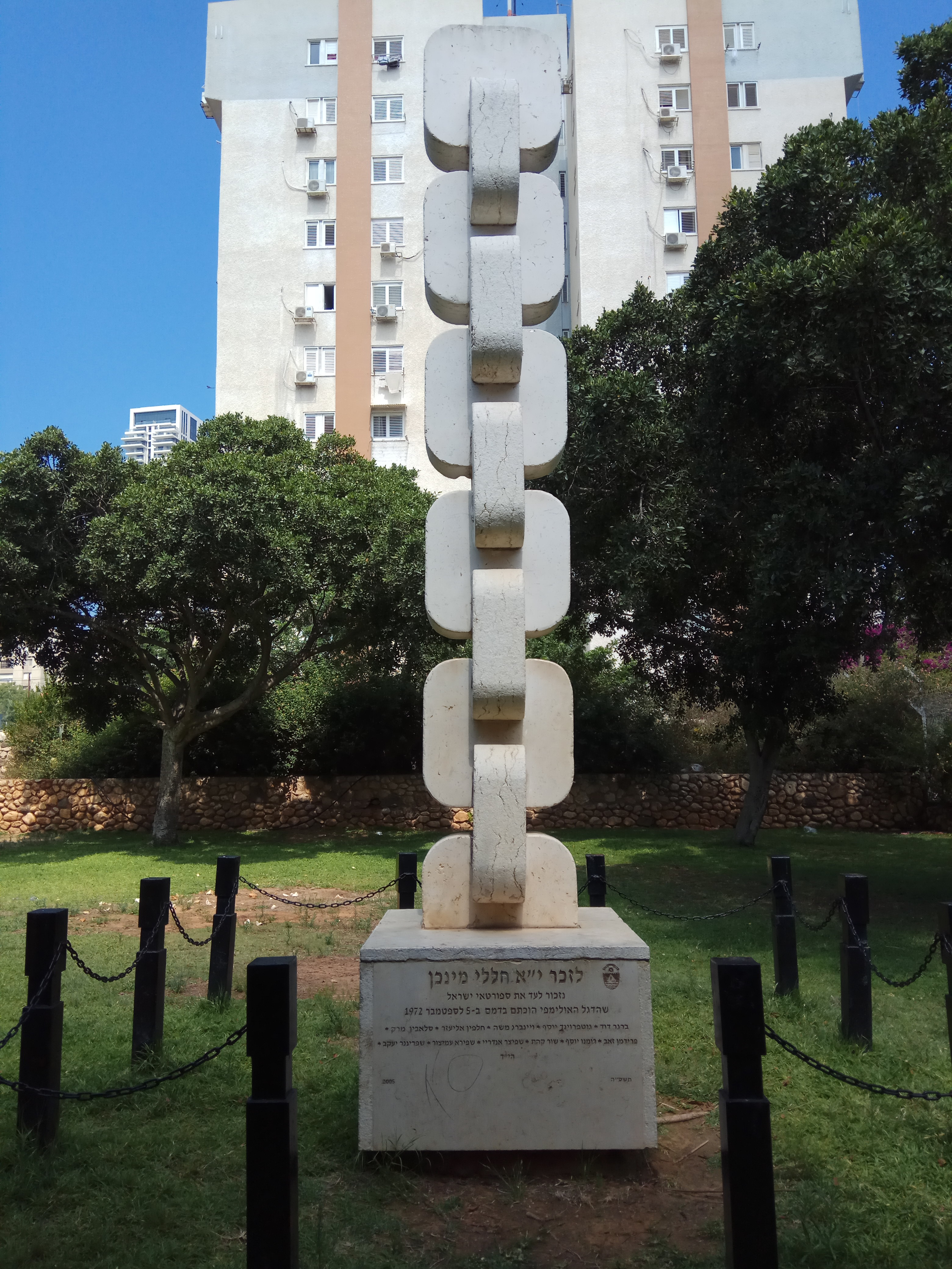 גן הי"א בבת ים